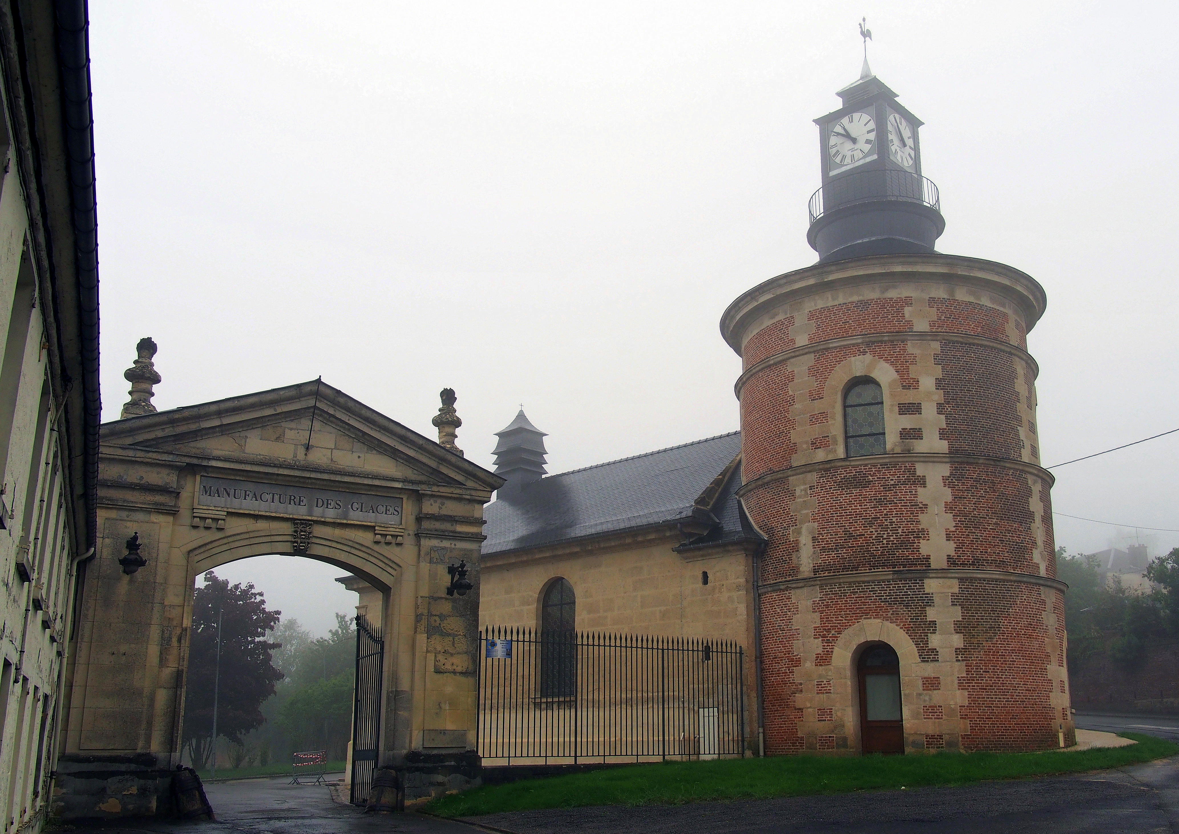 Manufacture royale de glaces de miroirs, (Inscrit, 15 mars 1995) .